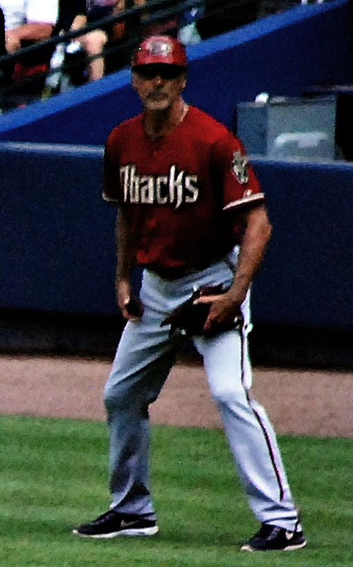 Dave McKay